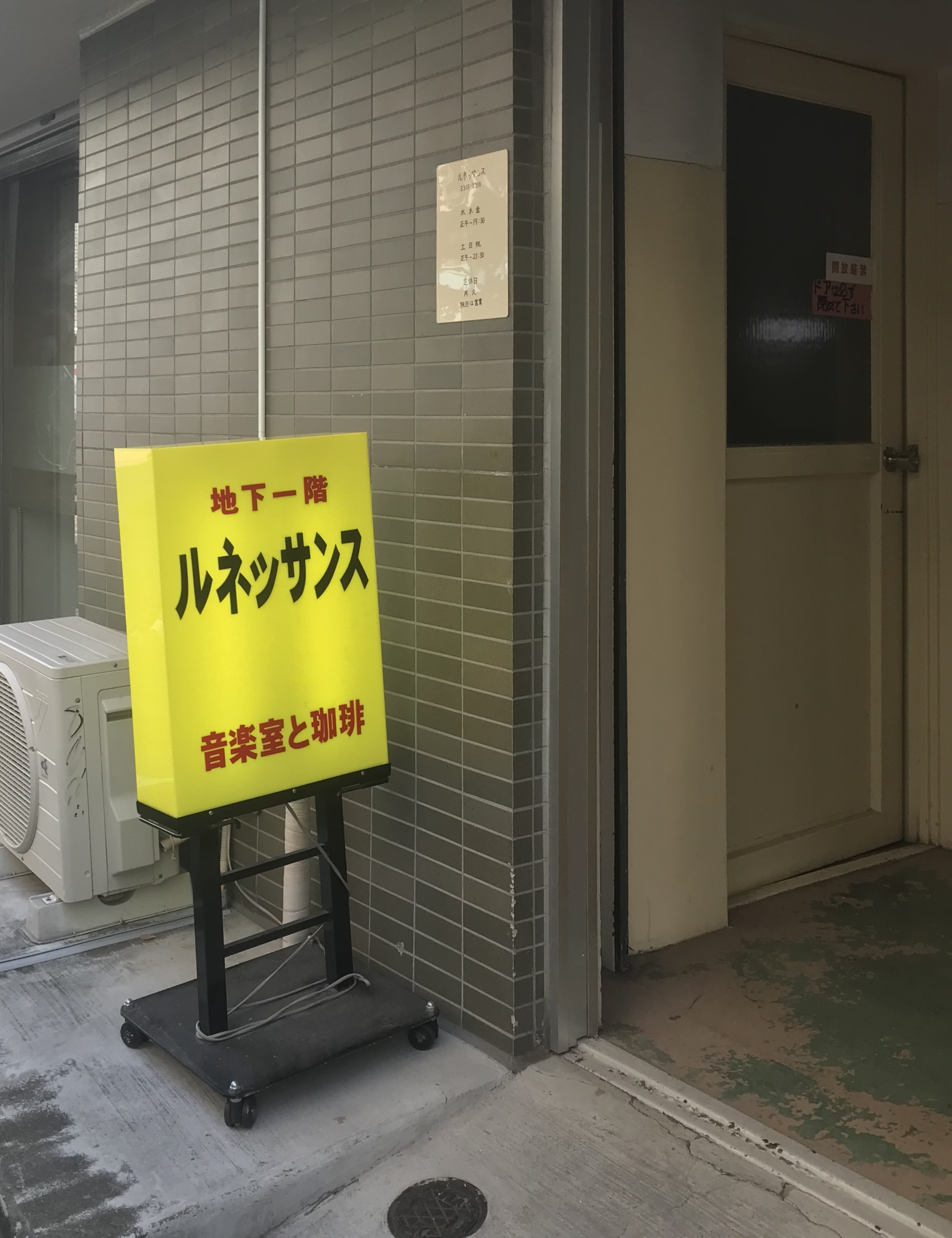 名曲喫茶ルネッサンスの地上入り口（店は地下一階）